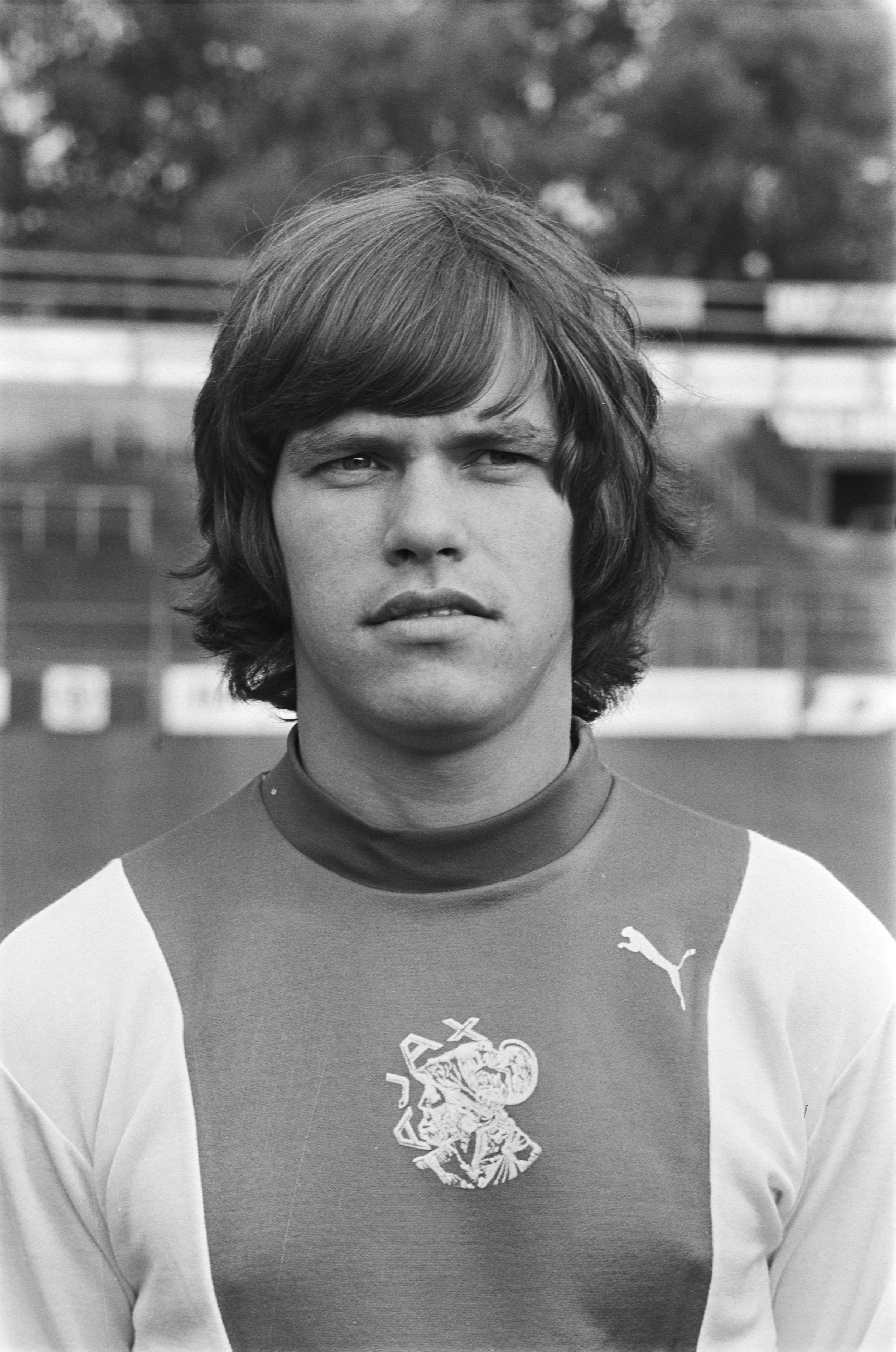 Collectie / Archief : Fotocollectie Anefo Reportage / Serie : [ onbekend ] Beschrijving : Persdag Ajax; nr. 2, 3 Frank Arnesen (kop), nr. 4 Rob Tervoort (kop) Datum : 24 juli 1978 Trefwoorden : sport, voetbal Fotograaf : Suyk, Koen / Anefo Auteursrechthebbende : Nationaal Archief Materiaalsoort : Negatief (zwart/wit) Nummer archiefinventaris : bekijk toegang 2.24.01.05 Bestanddeelnummer : 929-8308